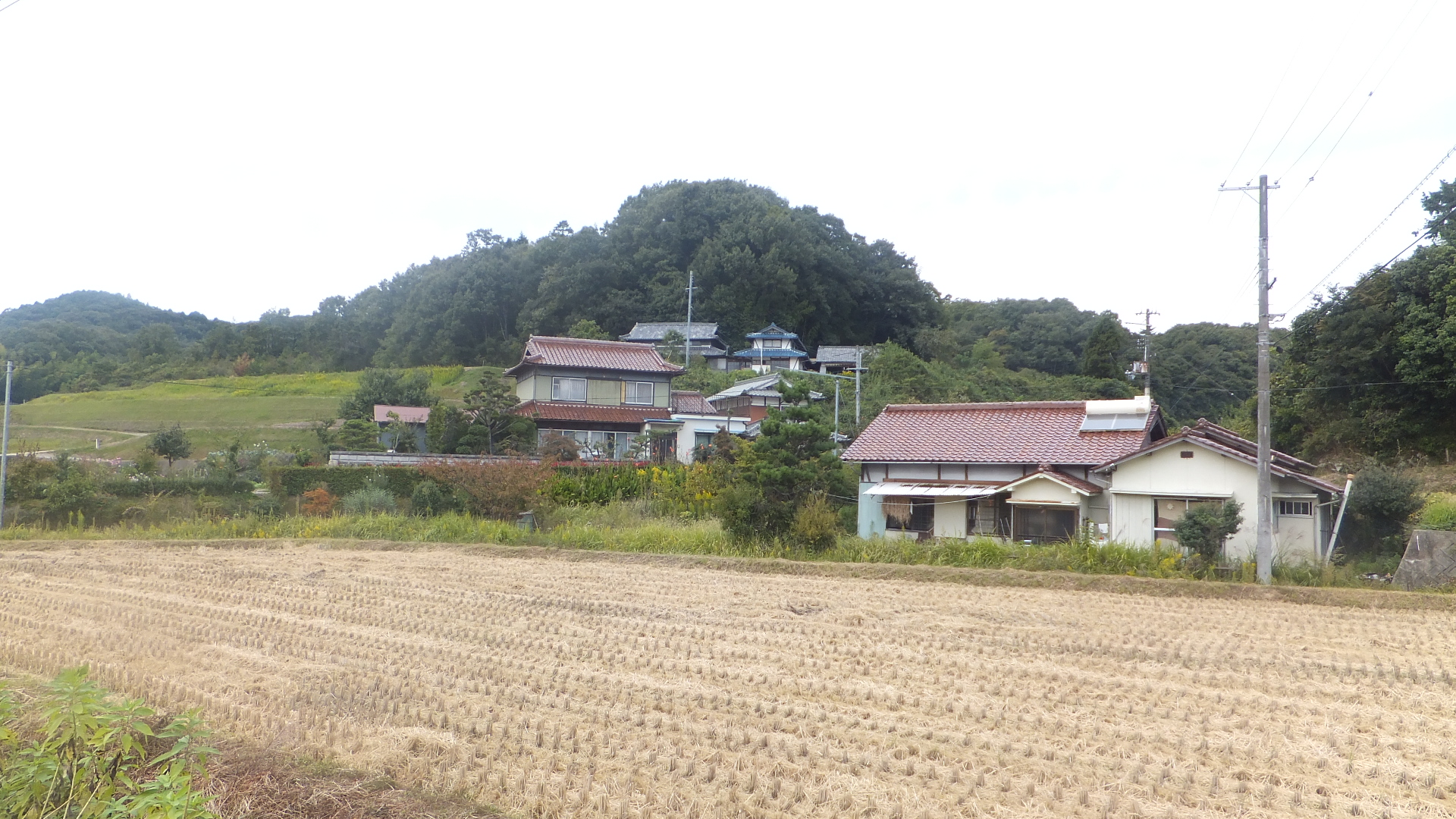 兵庫県三木市細川町中里